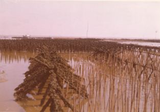 Parc à huîtres de M. PUYRAVEAU, à Talais, lieu-dit Cheyzin